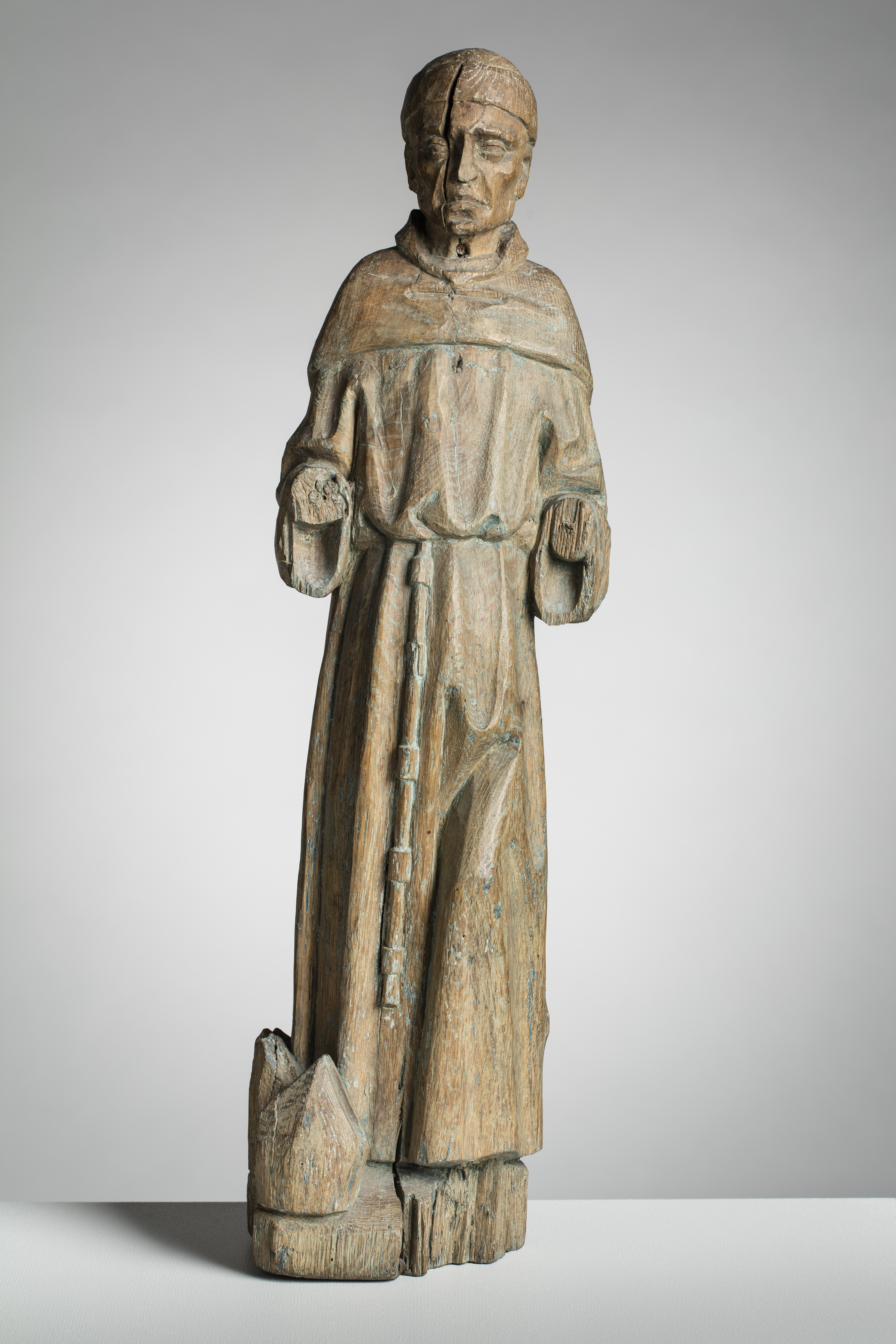 Kansallismuseon hallussa oleva Bernardino Sienalaisen veistos Pyhän Olavin kirkosta.